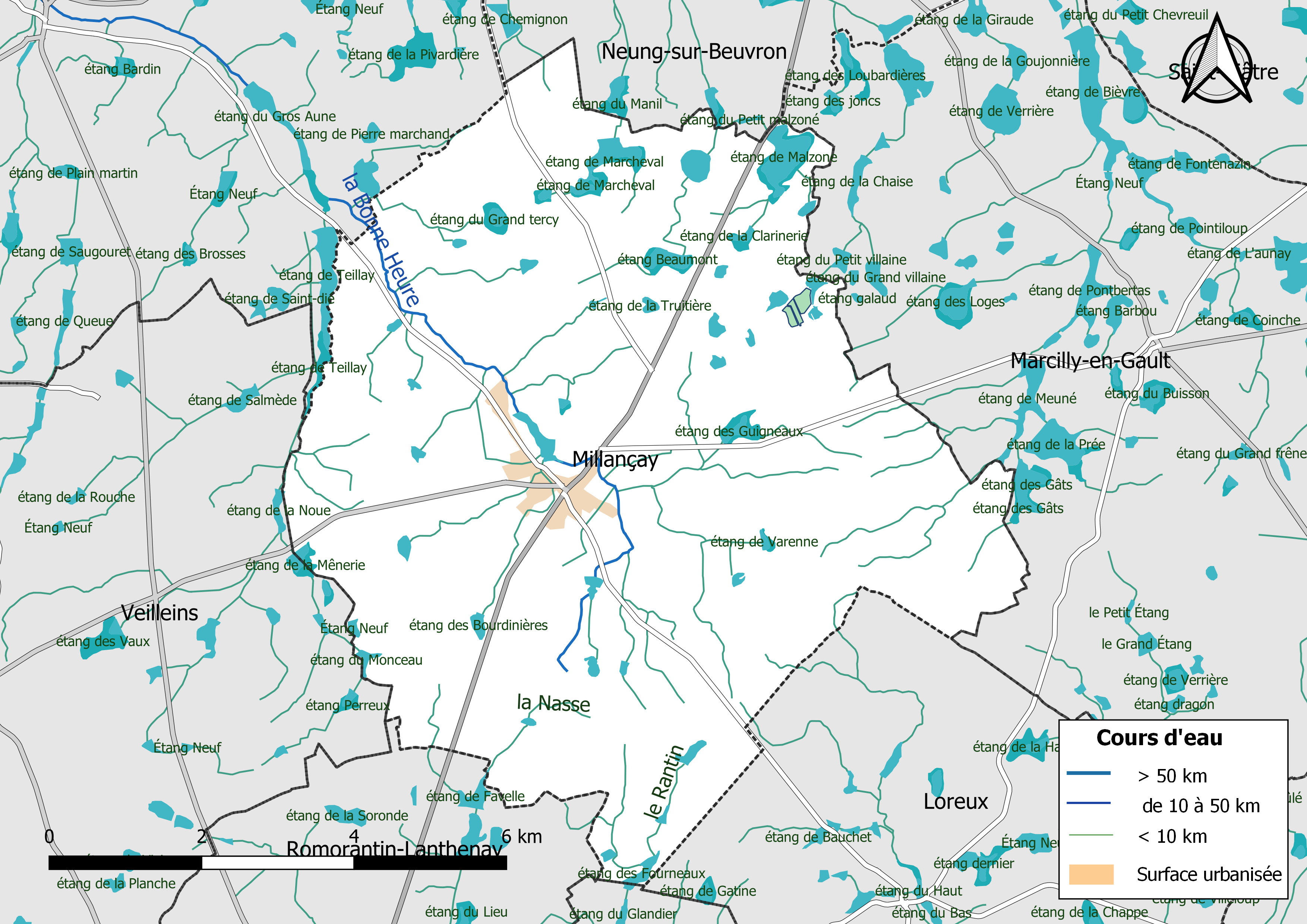 Carte du réseau hydrographique de la commune de Millançay (Loir-et-Cher, France).